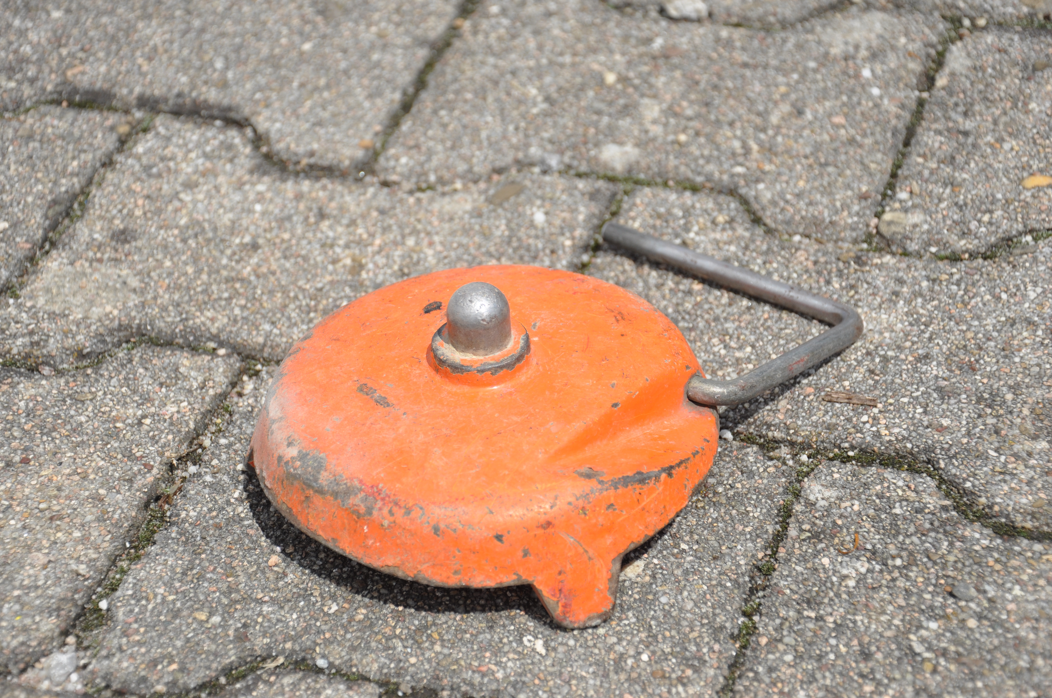 Frosch, der beim Nivellement eingesetzt wird